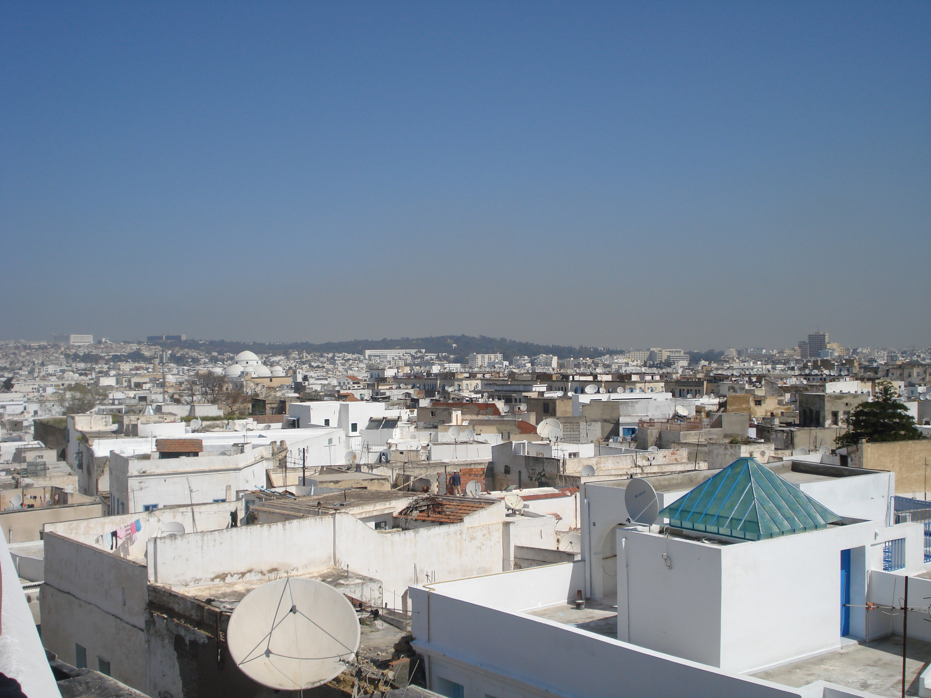 Vue de Tunis (Tunisie) depuis un bâtiment de la médina de la ville